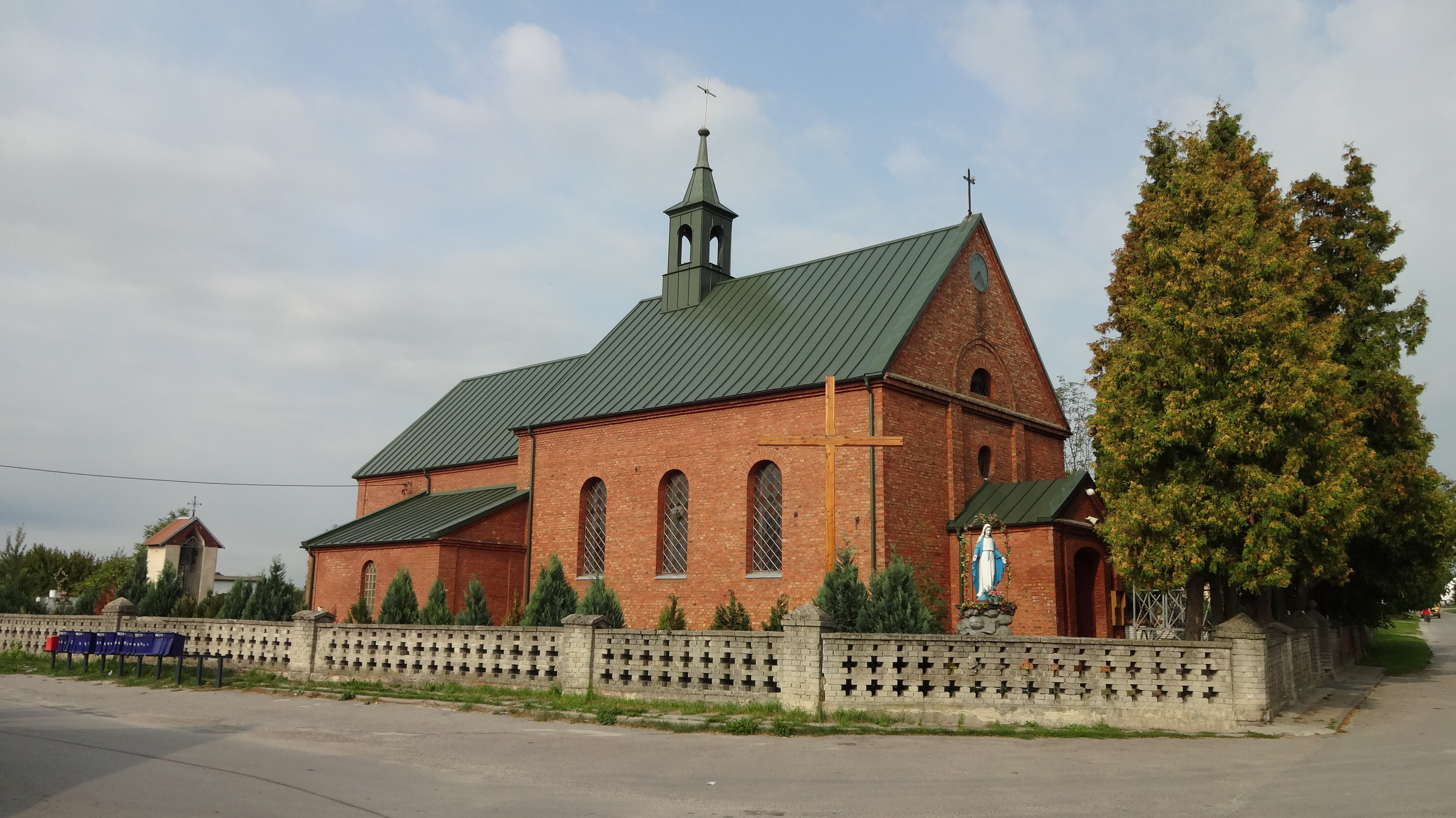 Kościół w Drużykowie